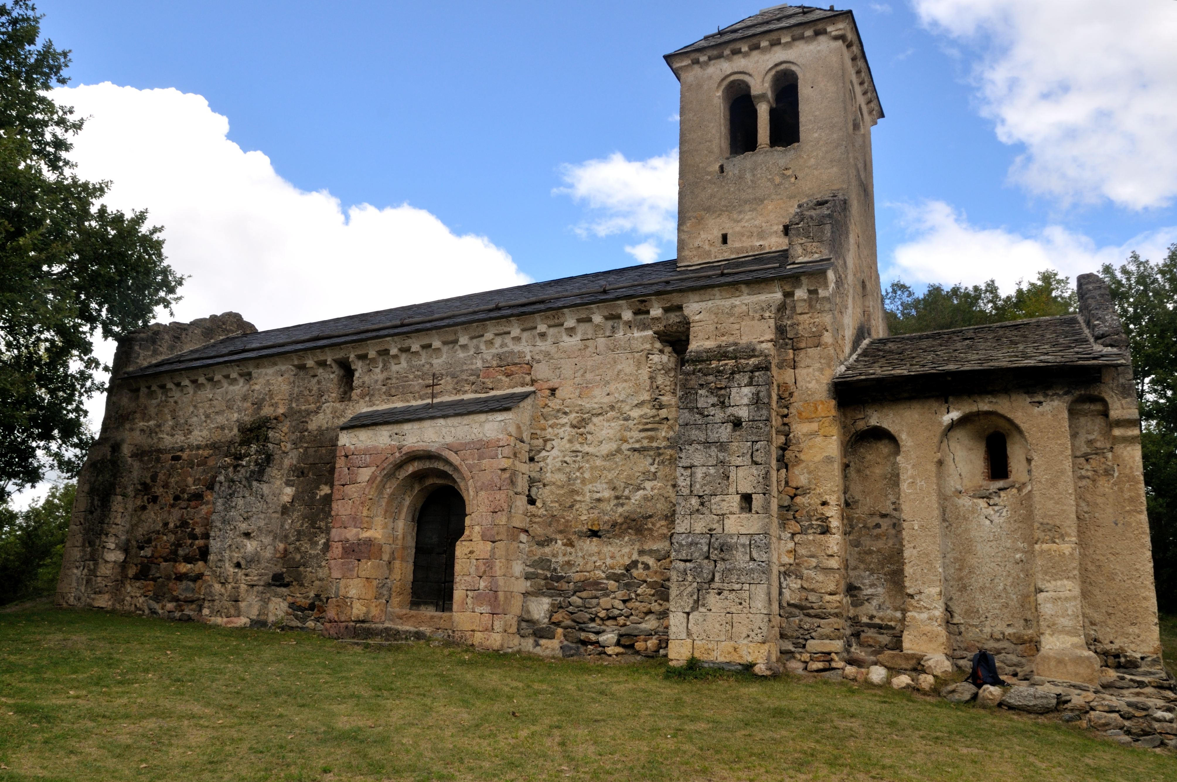 chapelle romane Xème -XIème siècle